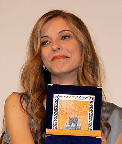 Maria Palma Petruolo